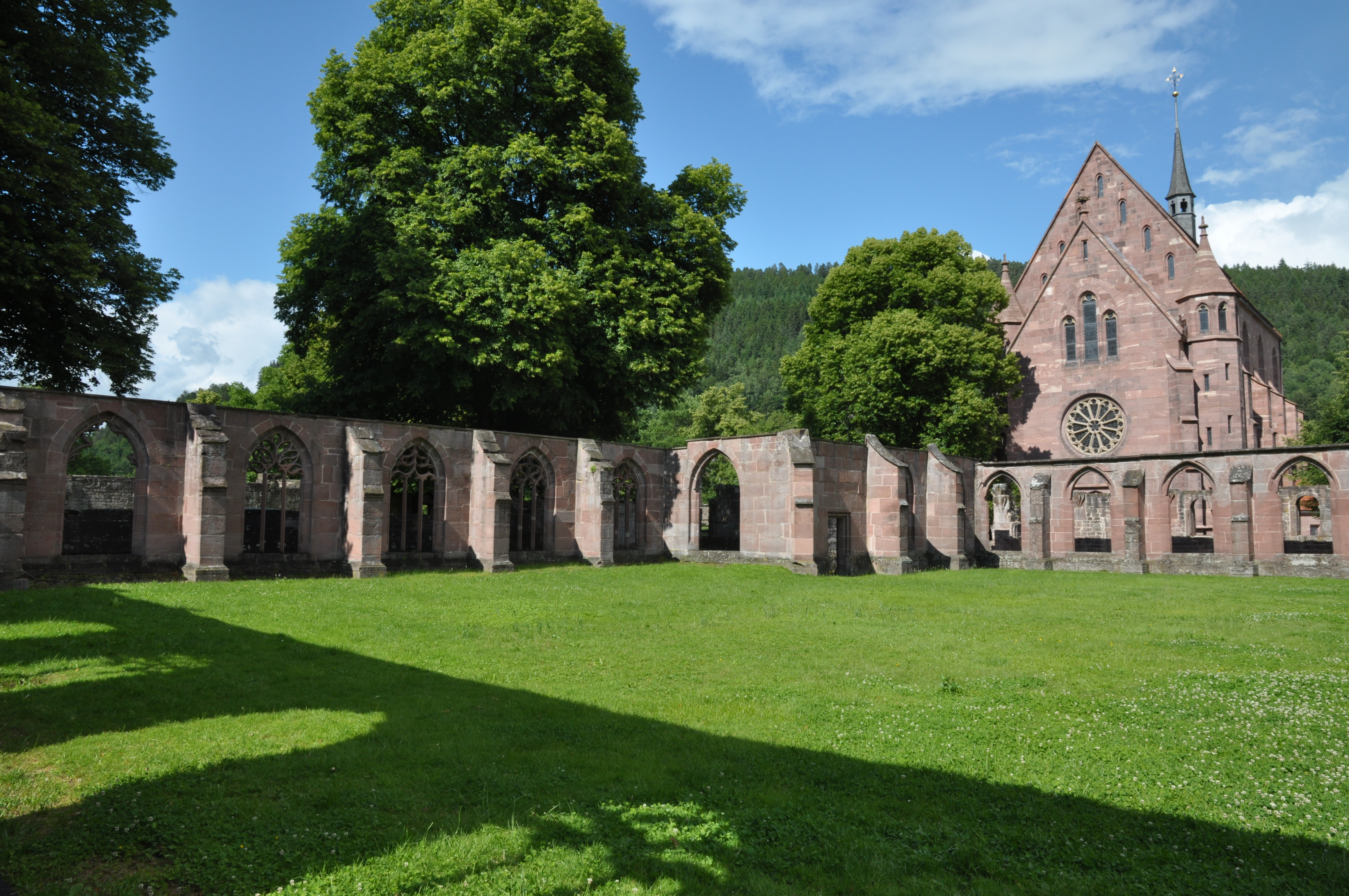 Kreuzgang Klosterruine Hirsau, im Hintergrund die Marienkapelle